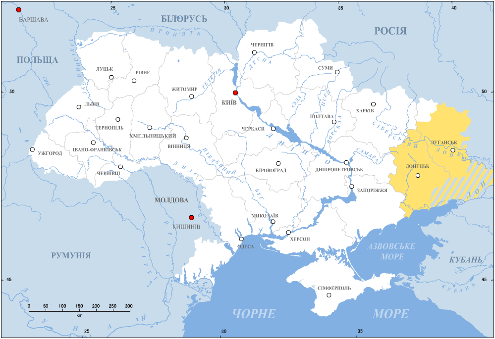 Мапа Донеччині